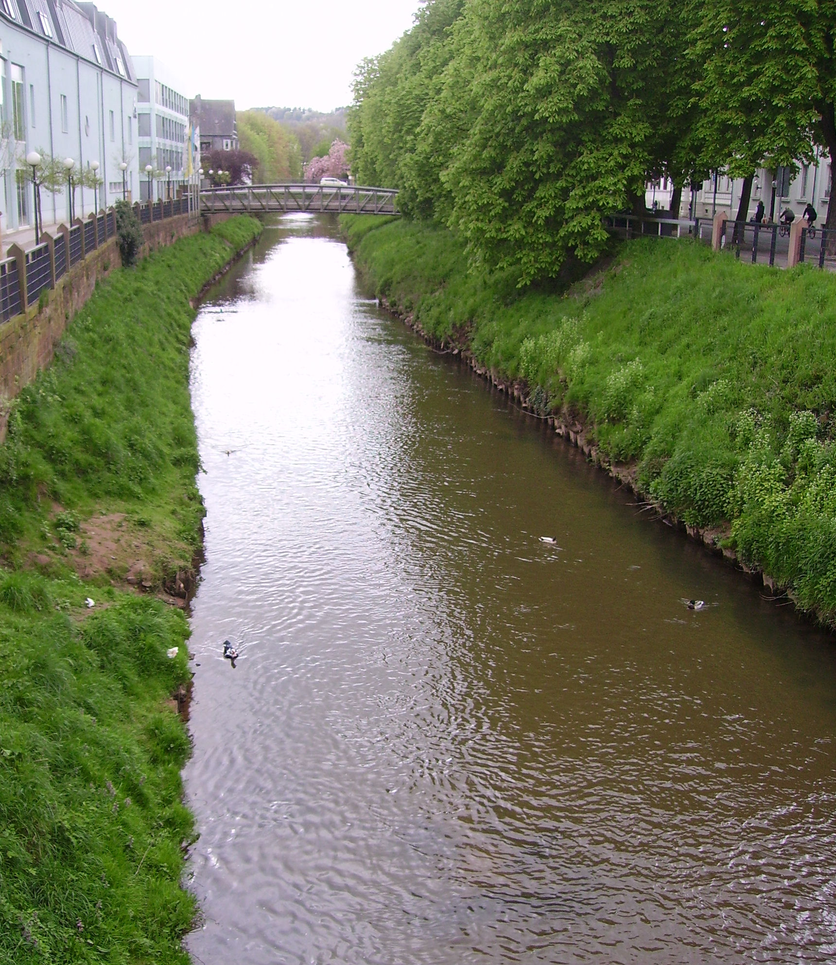 river in Zweibrücken, Germany